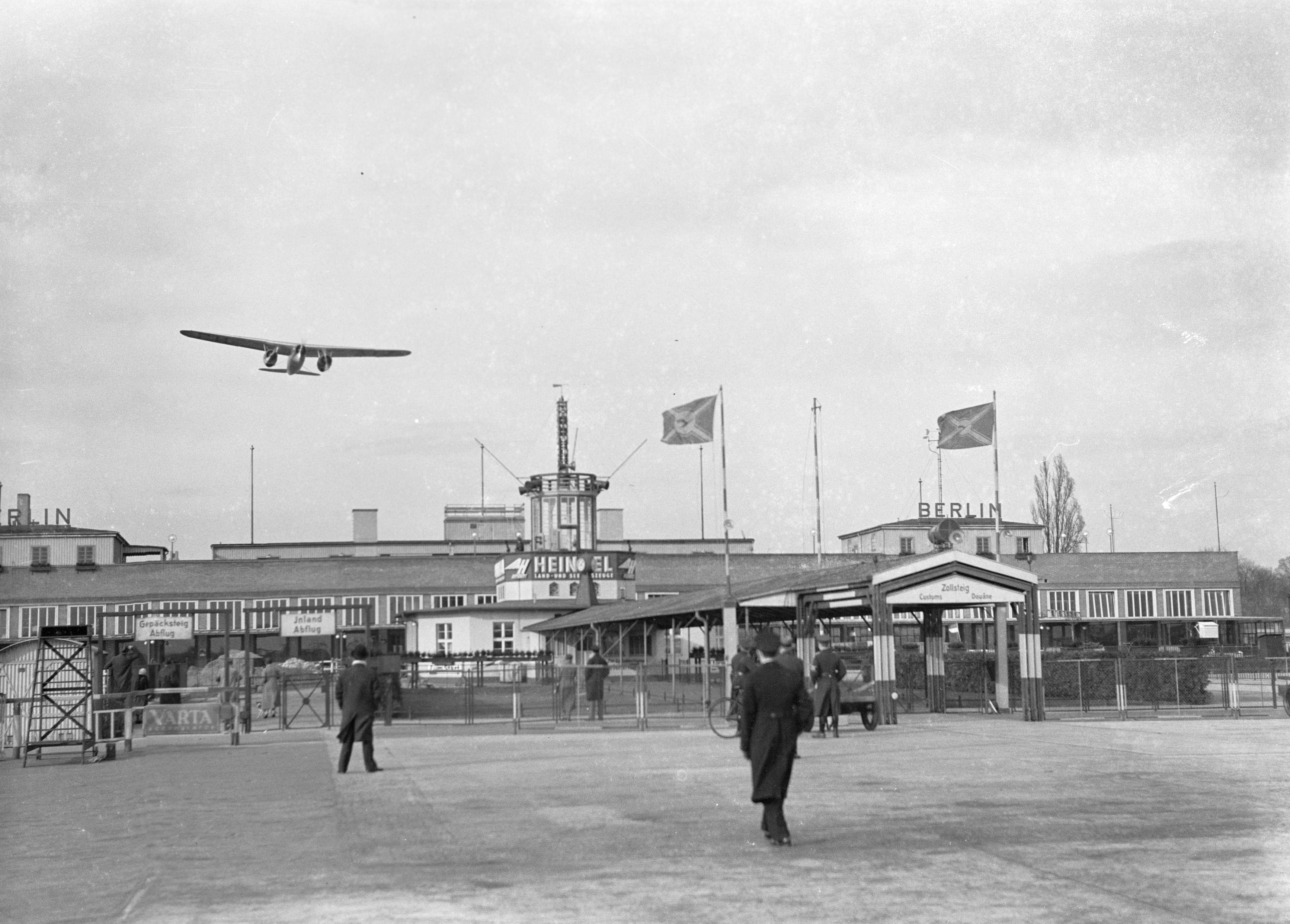 Fokker F.XX PH-AIZ Zilvermeeuw boven vliegveld Berlijn - Tempelhof.